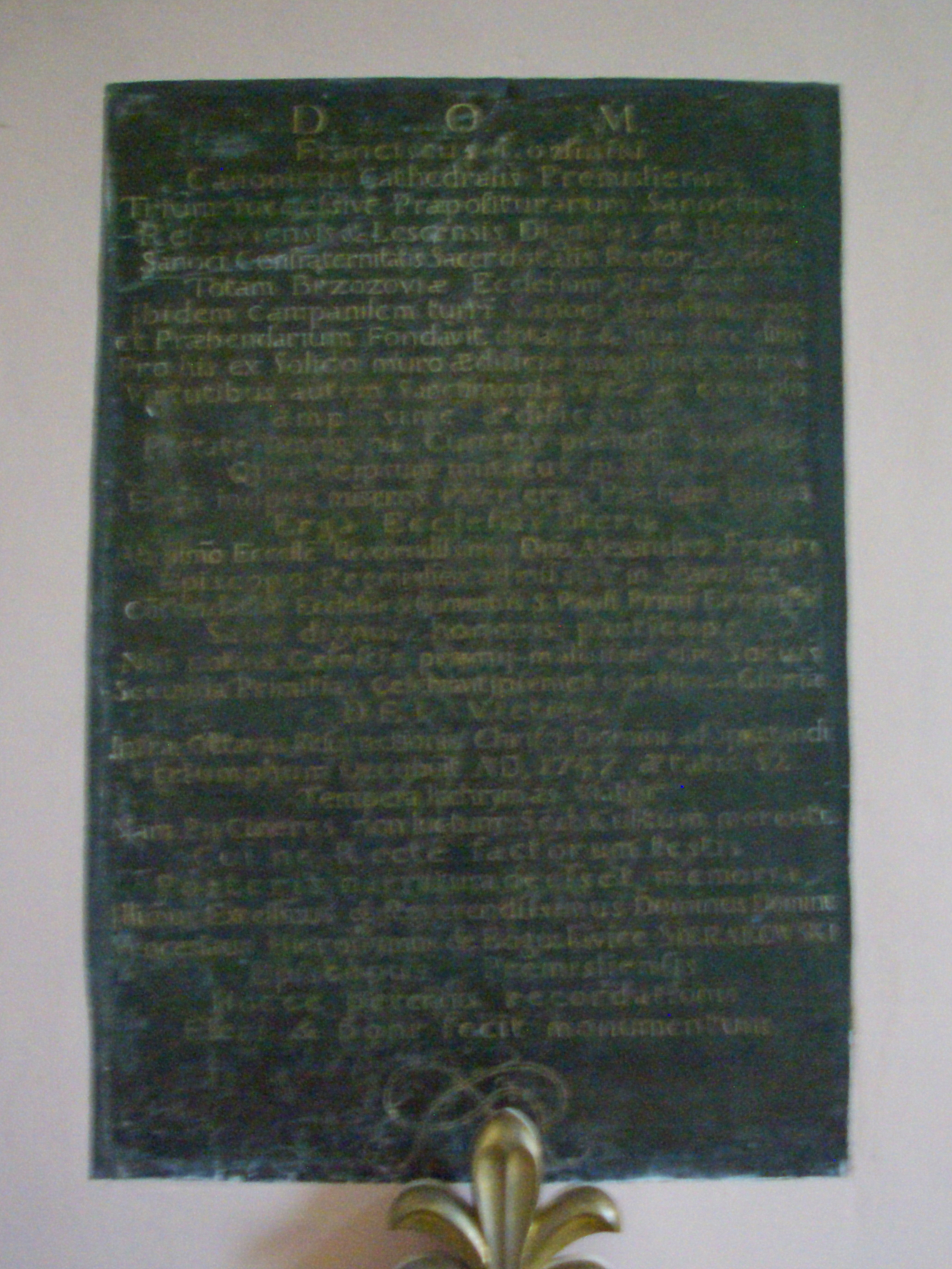 Epitafium Franciszka Goźlińskiego w kościele Przemienienia Pańskiego w Brzozowie.